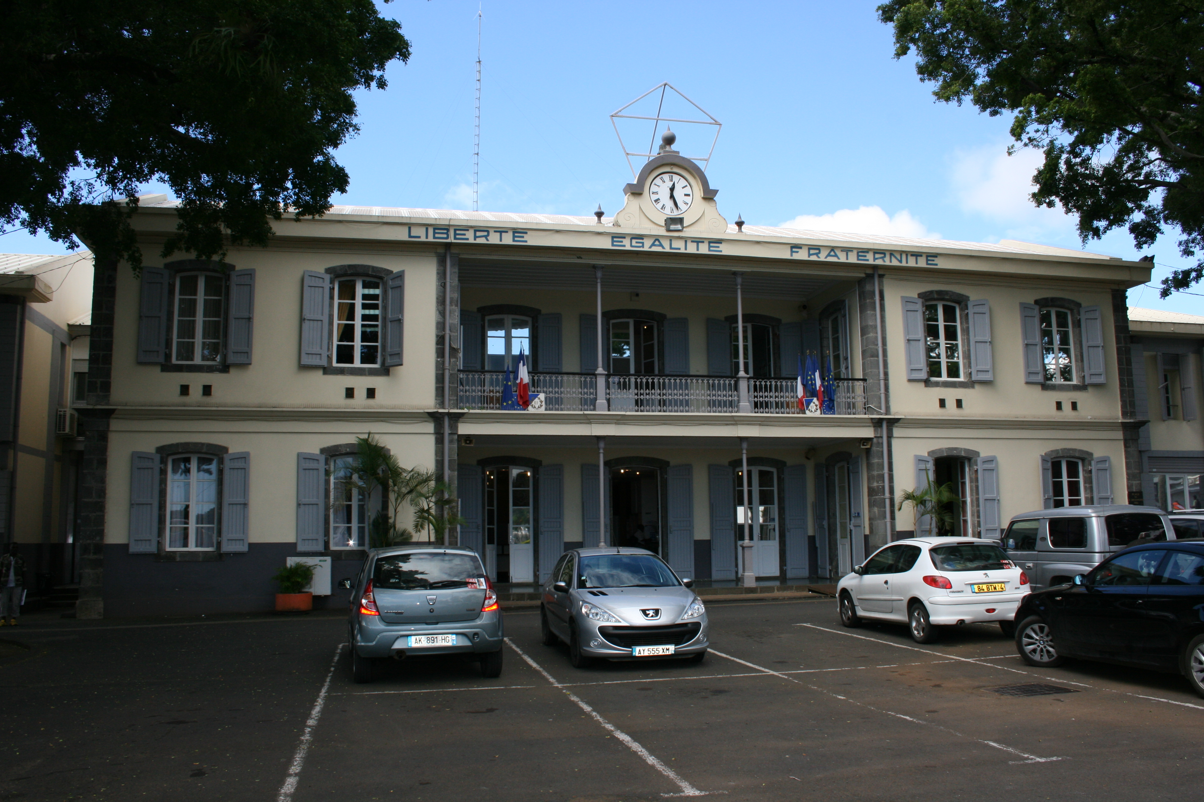 Vue de l'hôtel de ville de Saint-André de La Réunion.